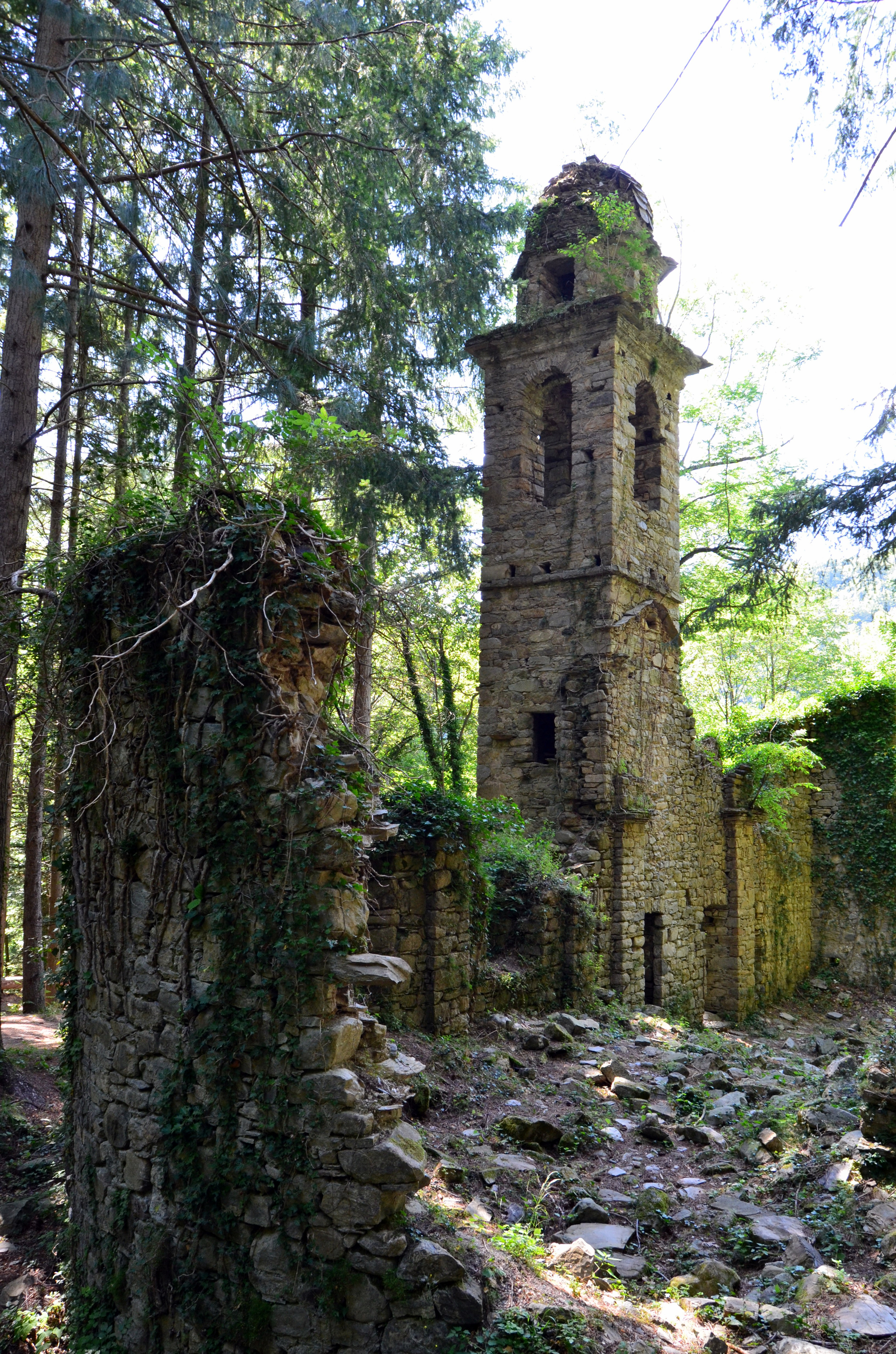 I ruderi della chiesa di San Martino di Licciorno, Prato Sopralacroce, Borzonasca, Liguria, Italia